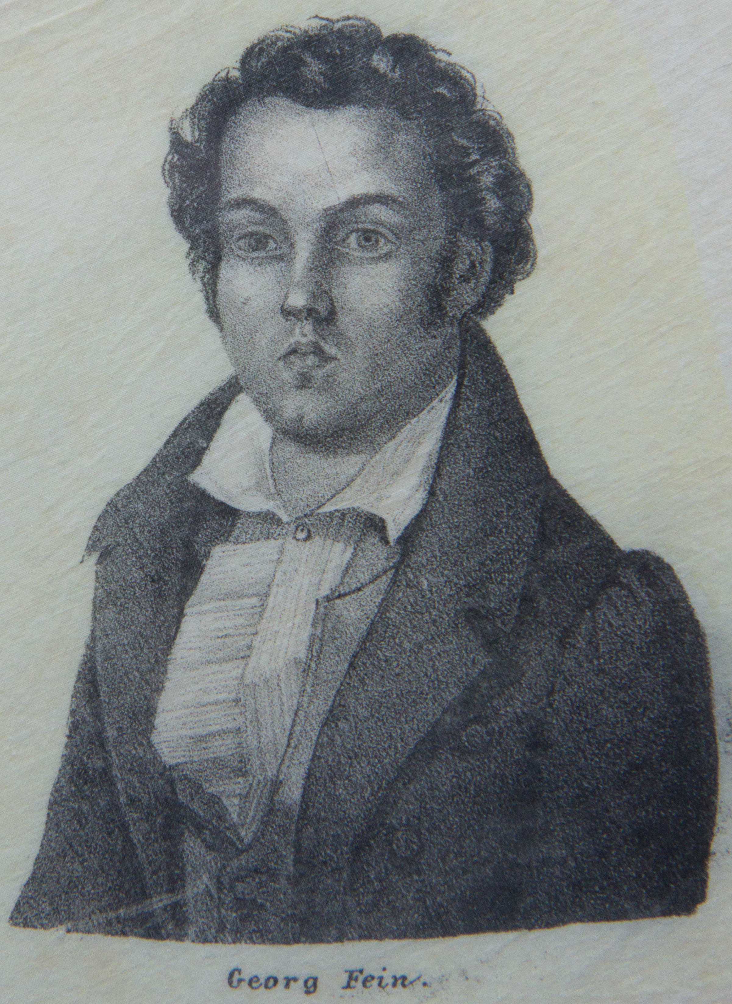 Hambacher Tuch, fotografiert im Archiv des Liberalismus in Gummersbach: Georg Fein (1803-1869)